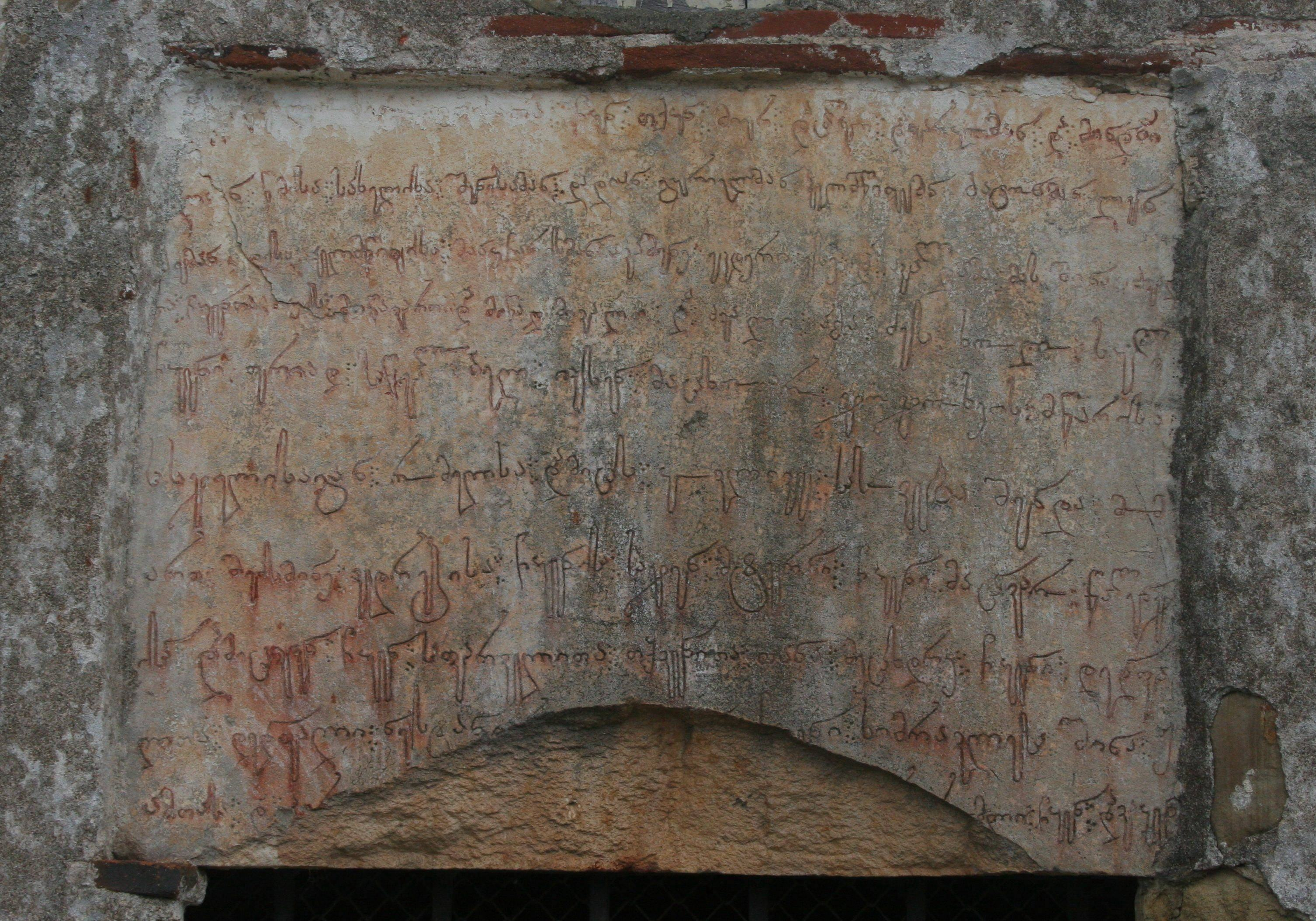 Tsalenjikha Cathedral (stalla), Tsalenjikha, Georgia